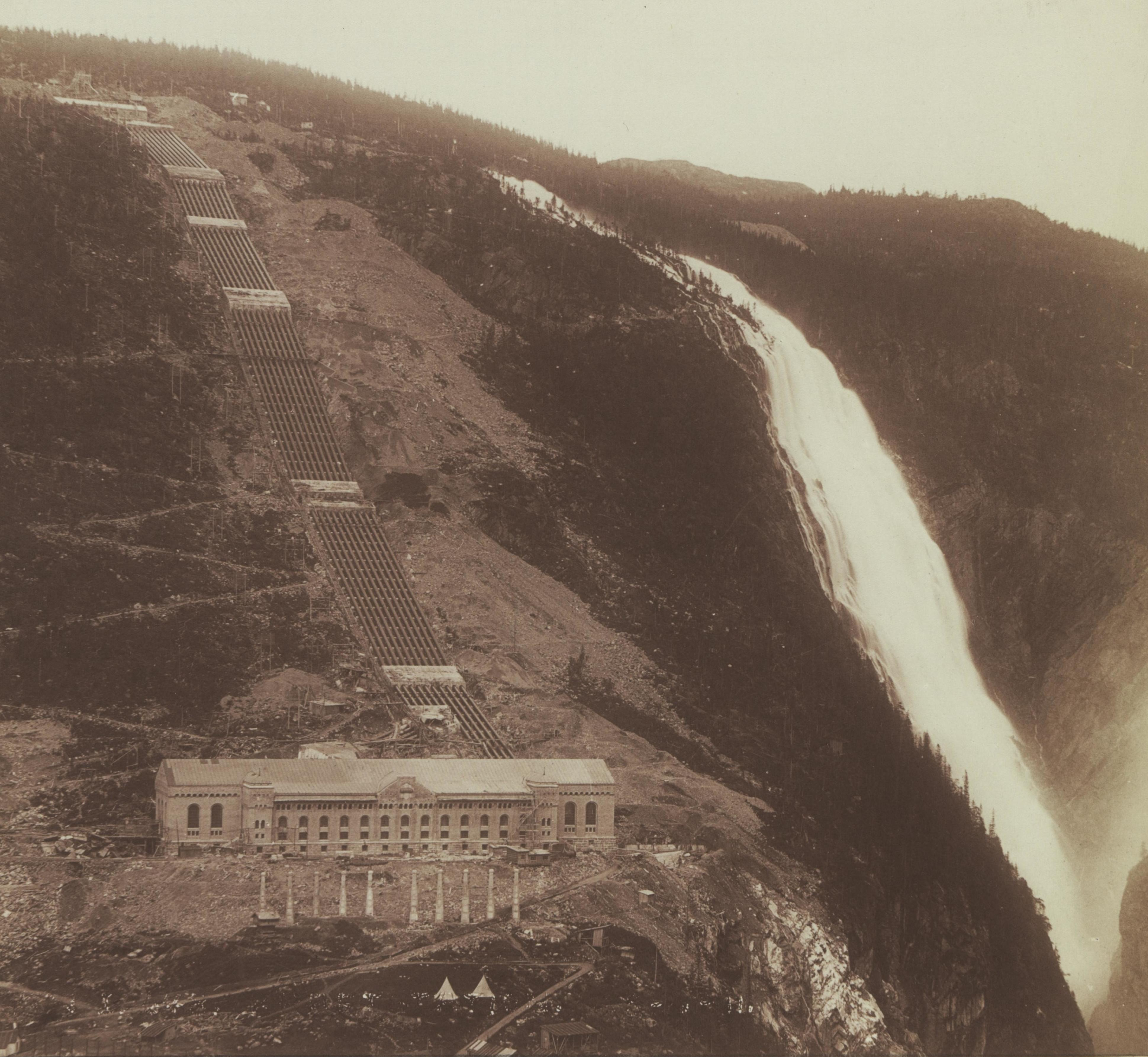 Bildet er hentet fra Nasjonalbibliotekets bildesamling Rjukan,Vemork, Tinn, Telemark